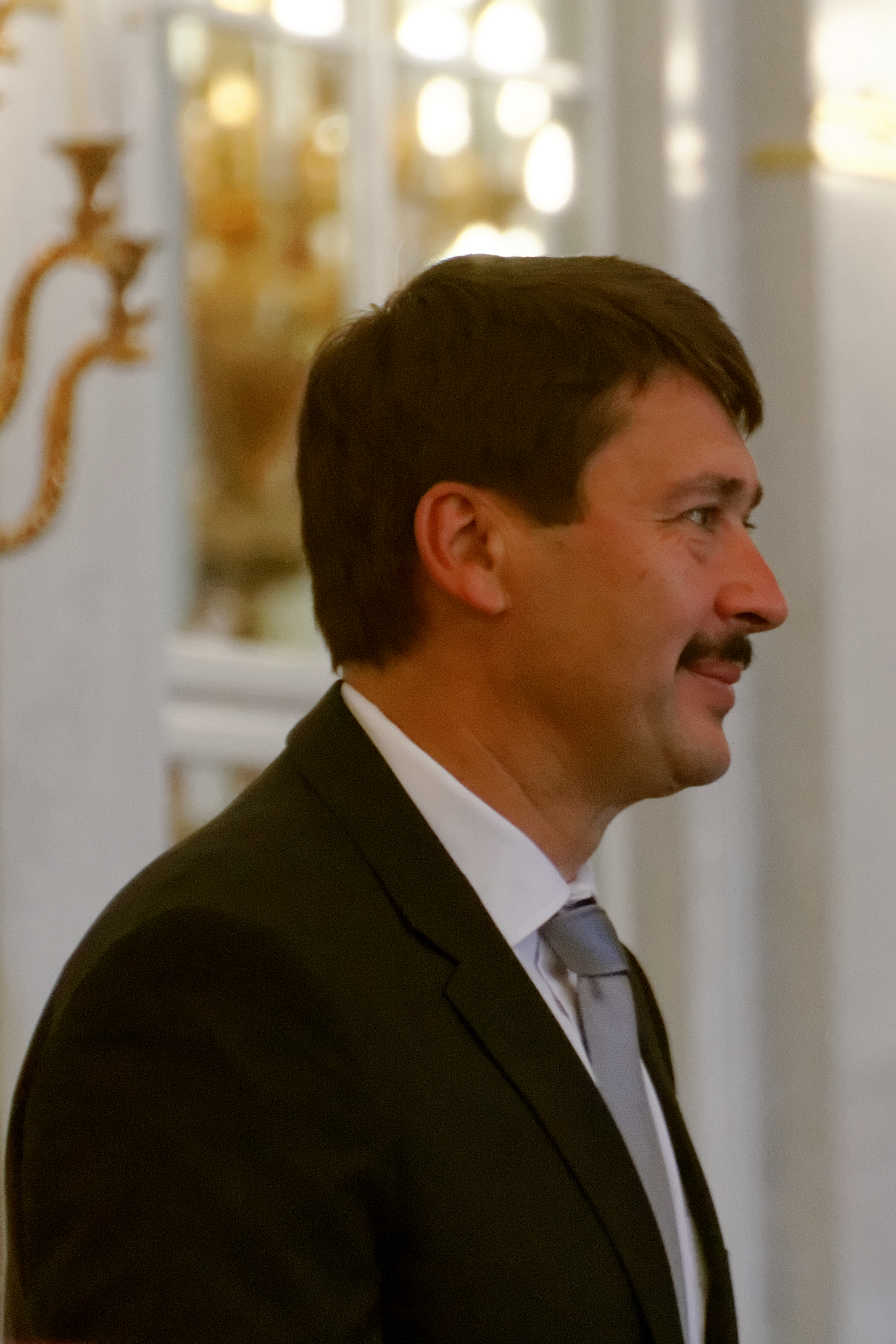 János Áder bei der Übergabe des Adalbert-Preises 2013 im Sandor-Palais